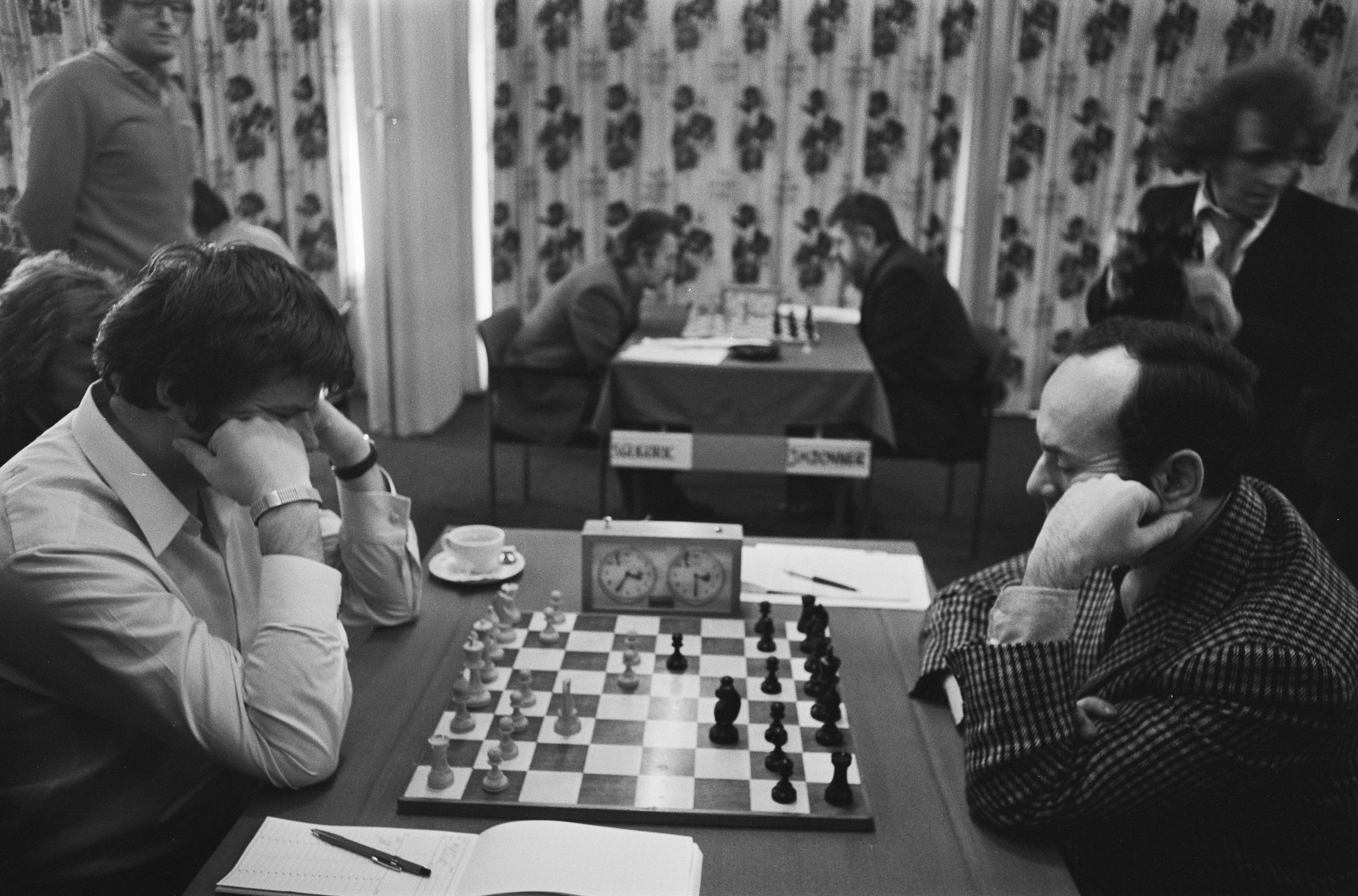 Collectie / Archief : Fotocollectie Anefo Reportage / Serie : [ onbekend ] Beschrijving : Hoogovenschaaktoernooi Wijk aan Zee ; Horst (l) tegen Portisch (r) Datum : 29 januari 1975 Locatie : Noord-Holland, Wijk aan Zee Trefwoorden : schaken Persoonsnaam : Horst Instellingsnaam : Hoogovenschaaktournooi Fotograaf : Verhoeff, Bert / Anefo Auteursrechthebbende : Nationaal Archief Materiaalsoort : Negatief (zwart/wit) Nummer archiefinventaris : bekijk toegang 2.24.01.05 Bestanddeelnummer : 927-7218